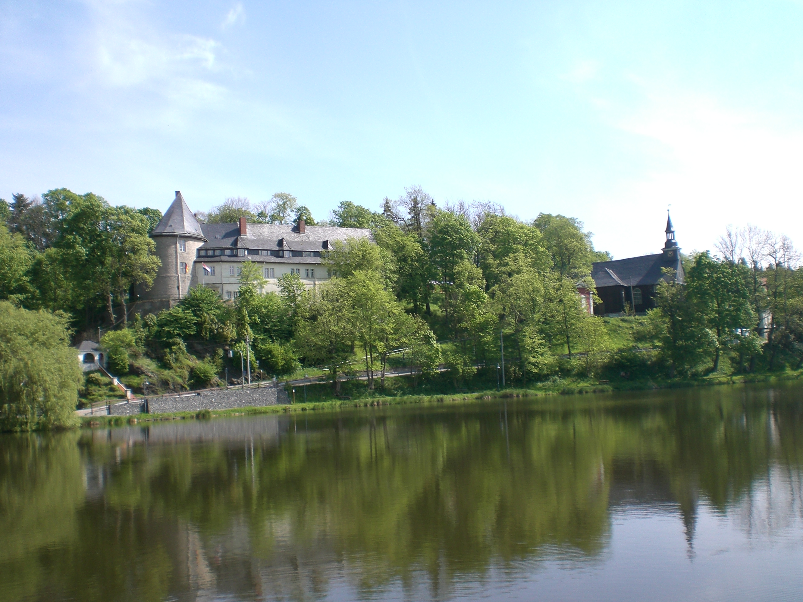 Stieger Schloss und Kirche